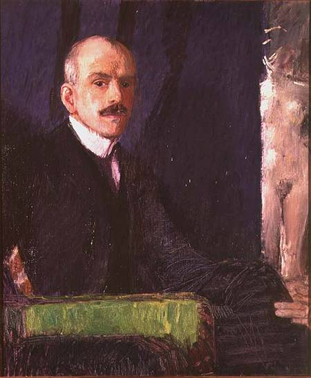 Self-portrait